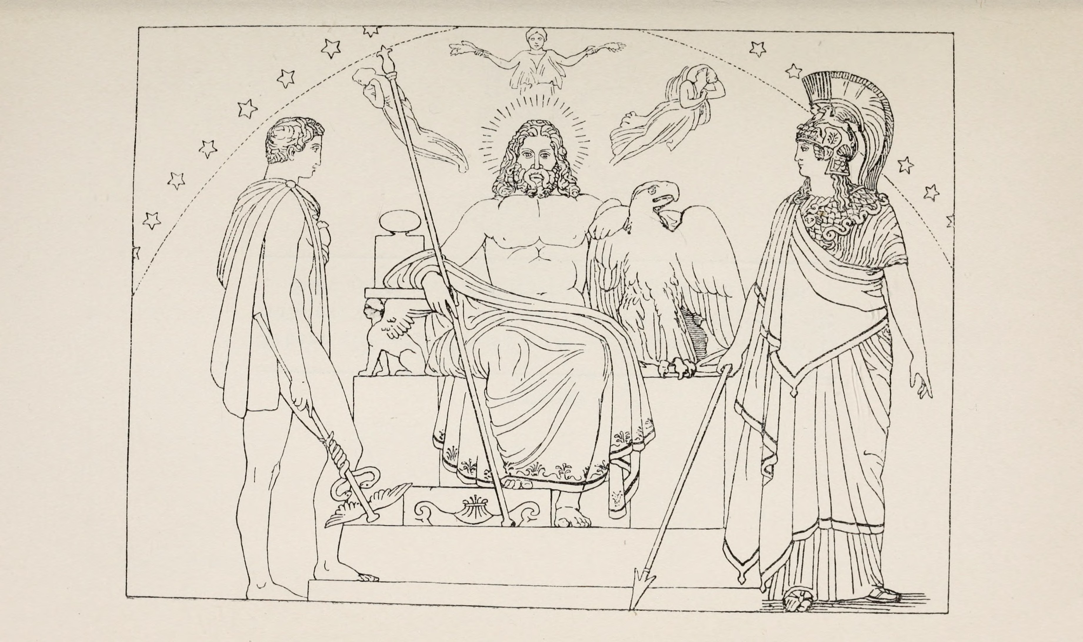 Zeus, Athene und Hermes, über des Odysseus Heimkehr beratend. – Homer, Odyssee I. 88. Schwab, Sagen des klassischen Altertums II. 206.